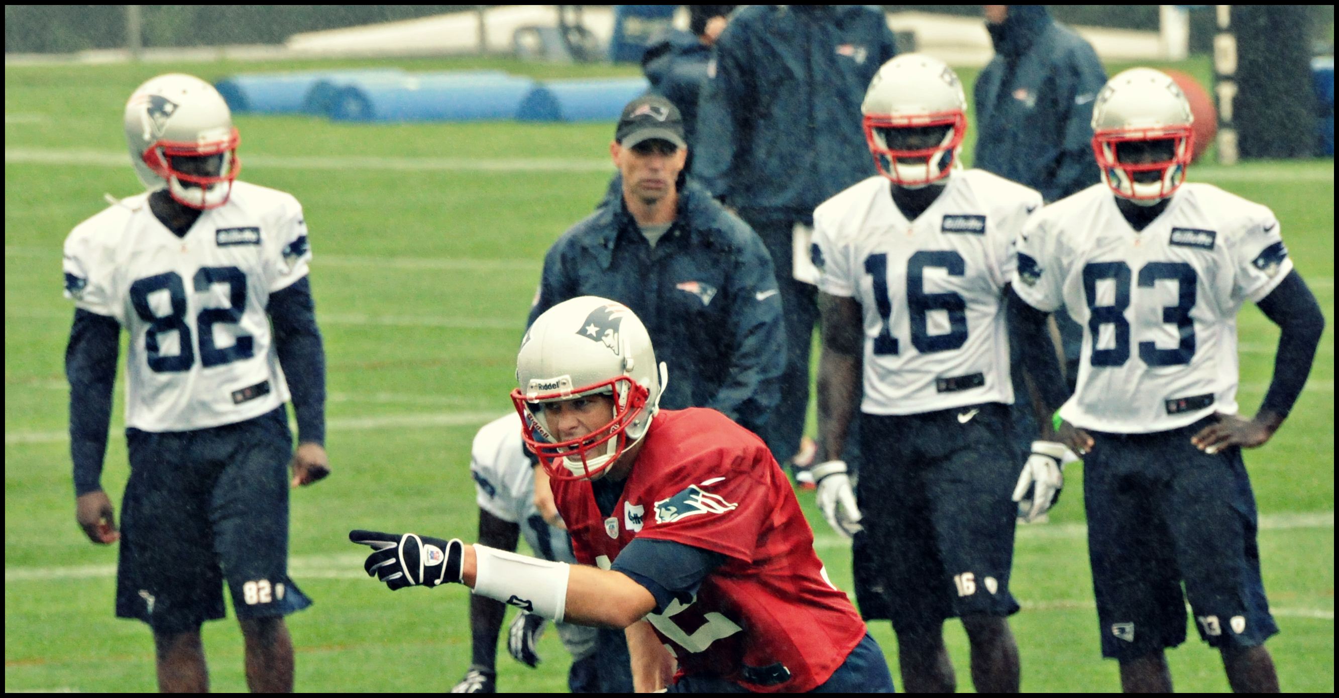 Tom Brady donnant ses instructions à la ligne défensive à l'entraînement